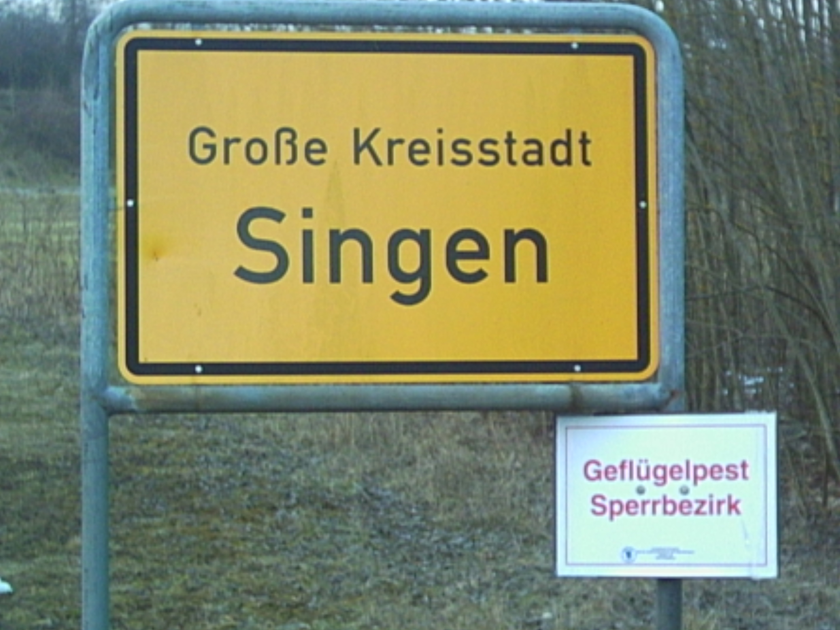 "Geflügelpest Sperrbezirk"-Schild in Singen